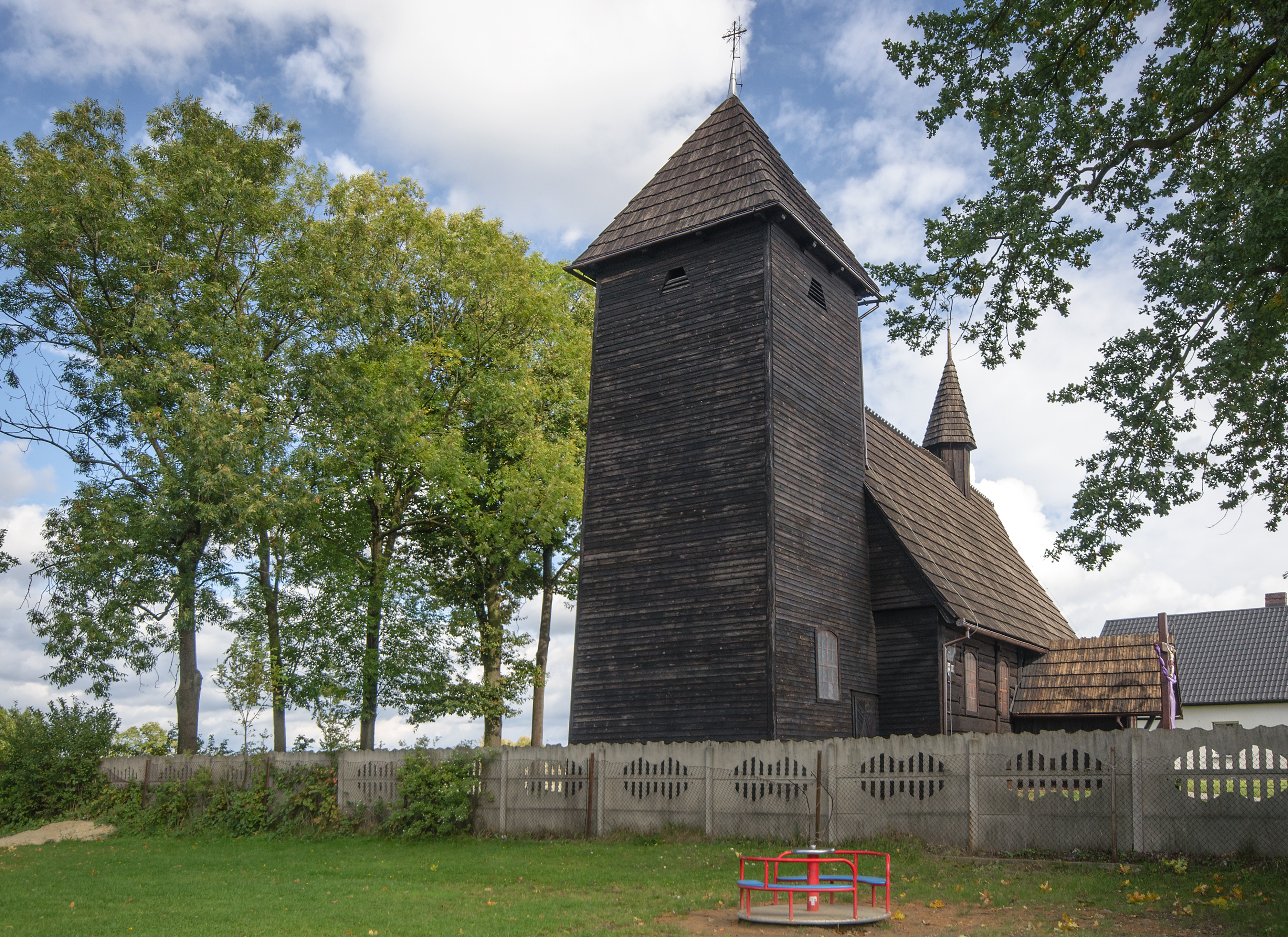 Grabowno Małe 22 - rzymskokatolicki kościół filialny p.w. Podwyższenia Krzyża Świętego, drewn., 2 poł. XVIII, XIX